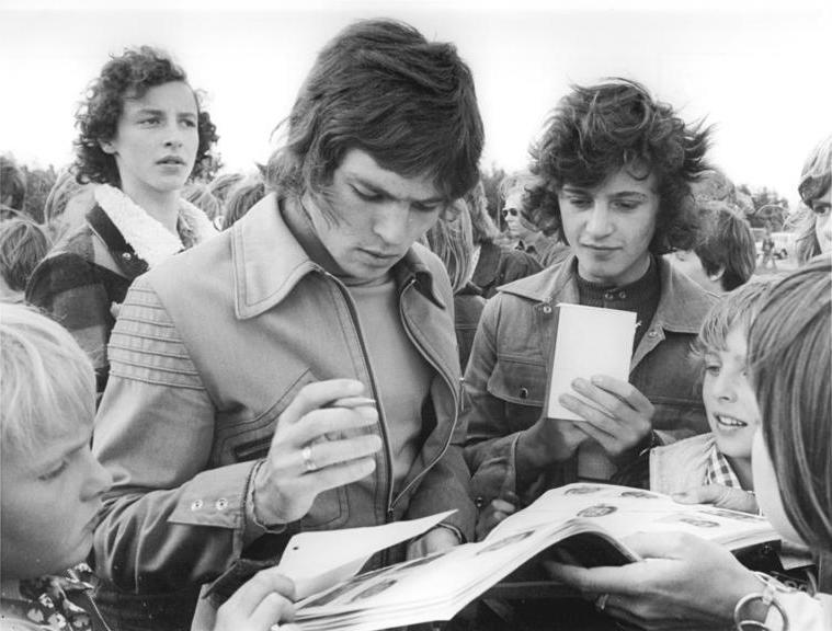 ADN-ZB-Mittelstädt-15.6.74-BRD-Hamburg: X. Fußball-Weltmeisterschaft 1974- Jürgen Pommerenke wird im Trainings-Quartier der DDR-Spieler in Quickborn von jungen Autogrammjägern umringt.